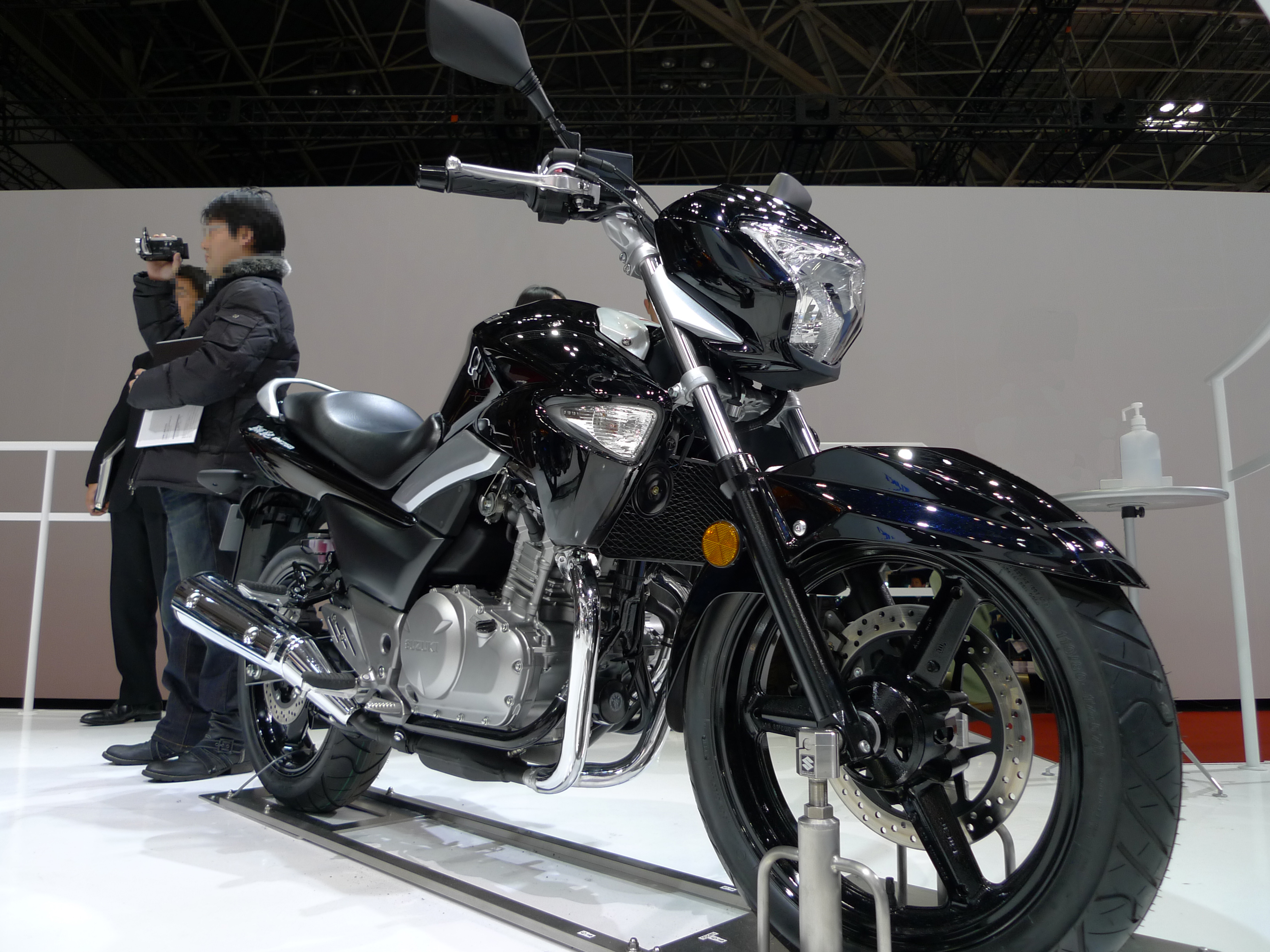 スズキ・GW250 2012 東京モーターショーにて撮影